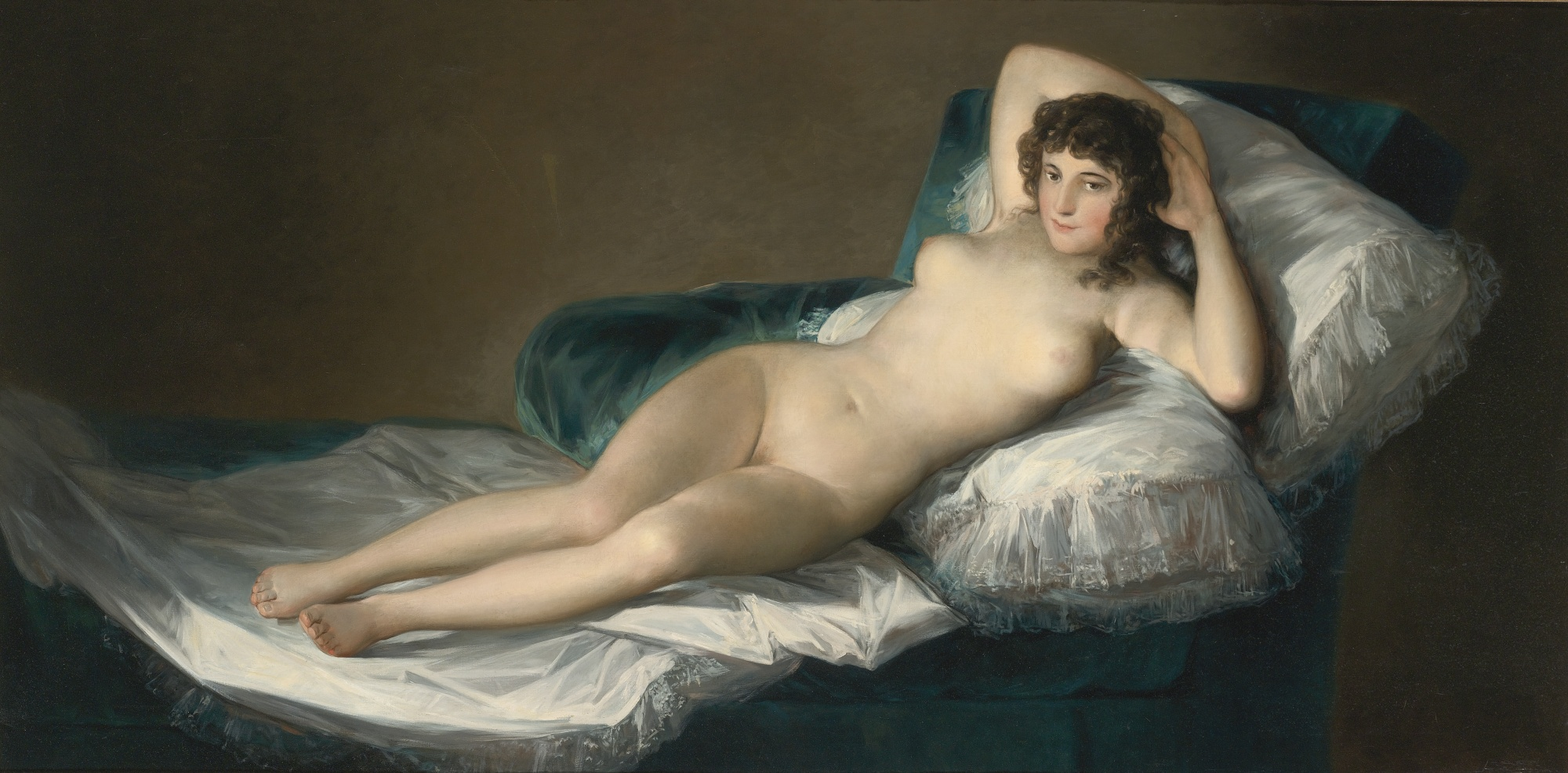 Maja desnuda (oil on canvas; 96.2 by 189.4 cm)